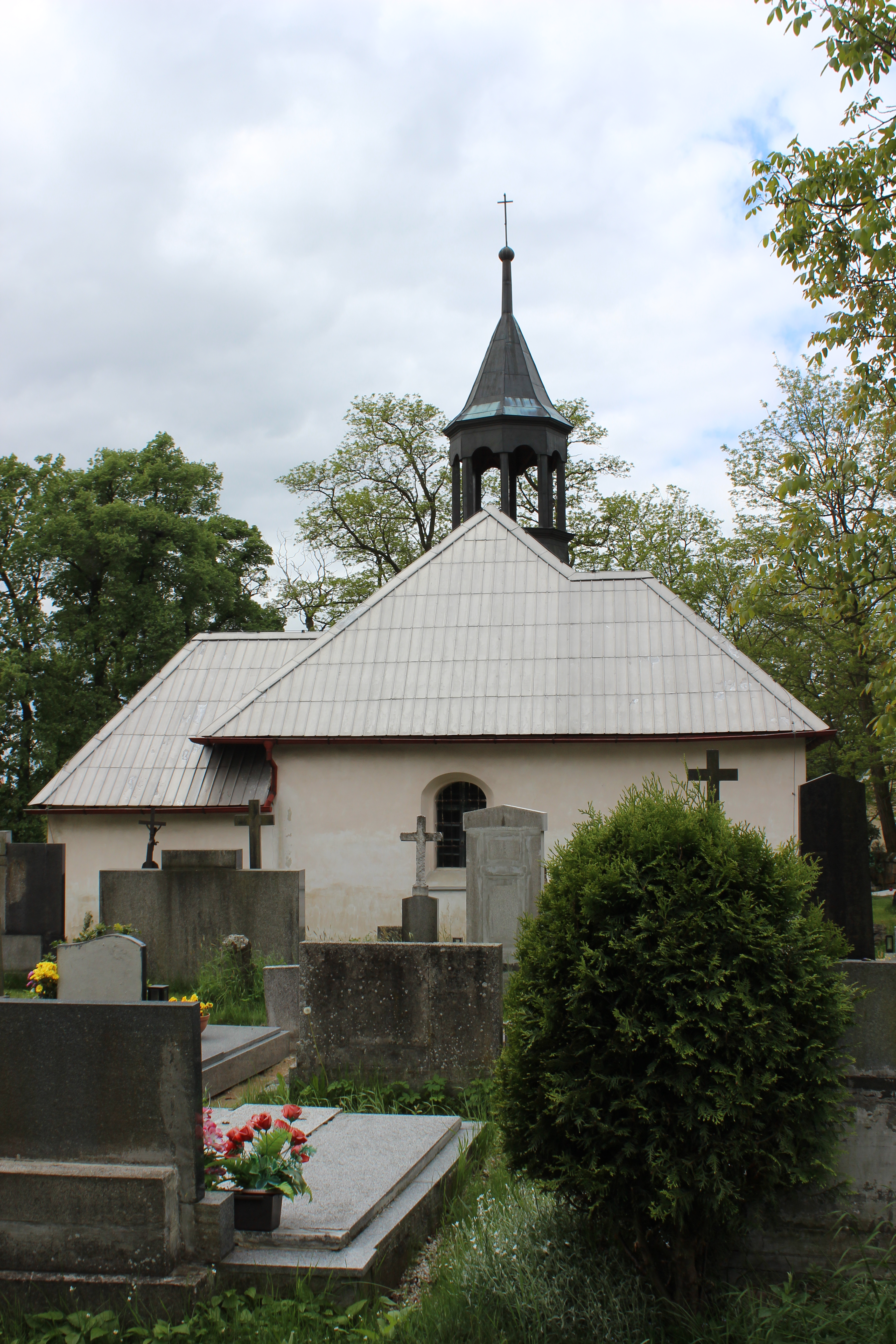 Kostelík Povýšení sv. Kříže v Lobči, okres Mělník. Project: Fotíme Česko.